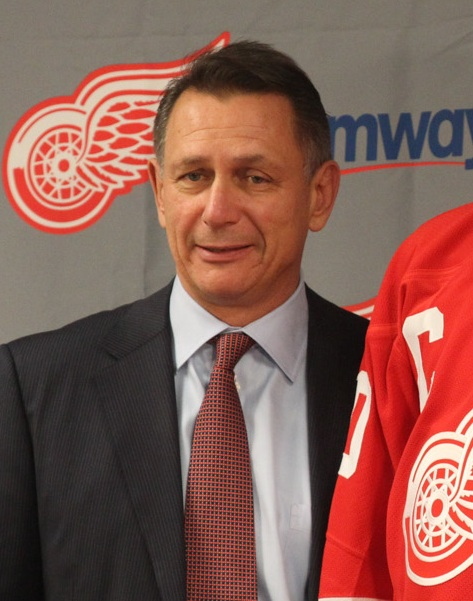 Ken Holland, Henrik Zetterberg and coach Mike Babcock.